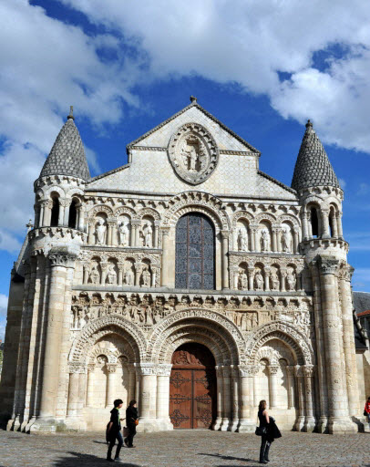 Eglise Notre-Dame la grande